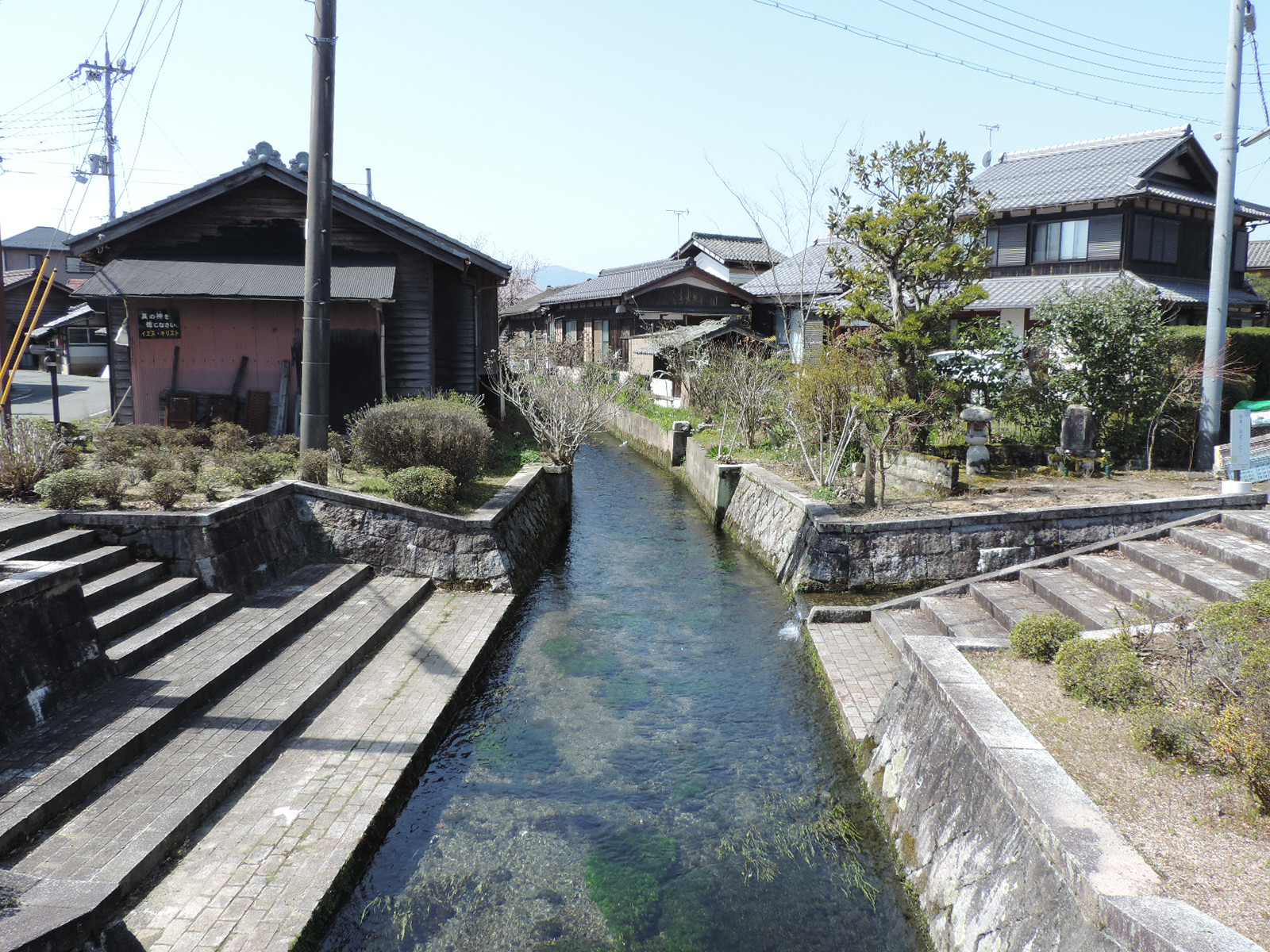 針江区より針江大川の上流側をのぞむ